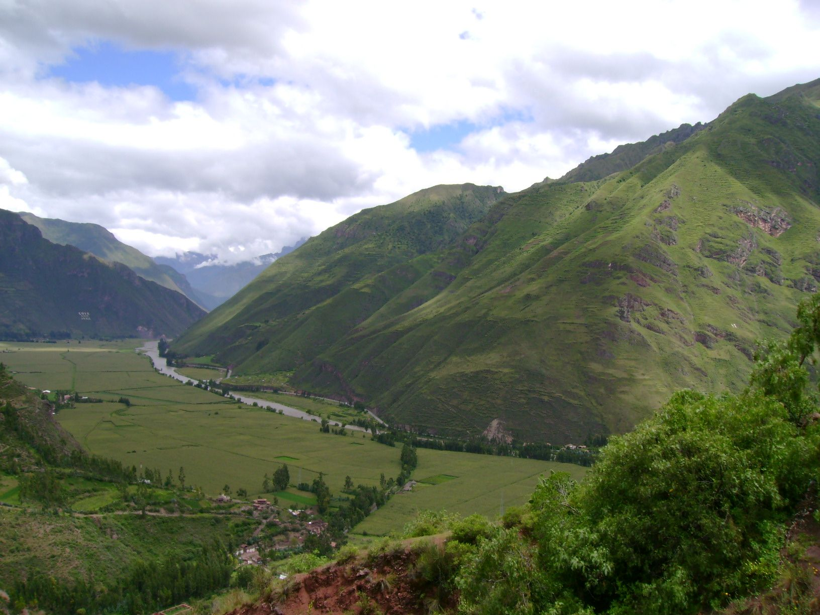 Urubamba